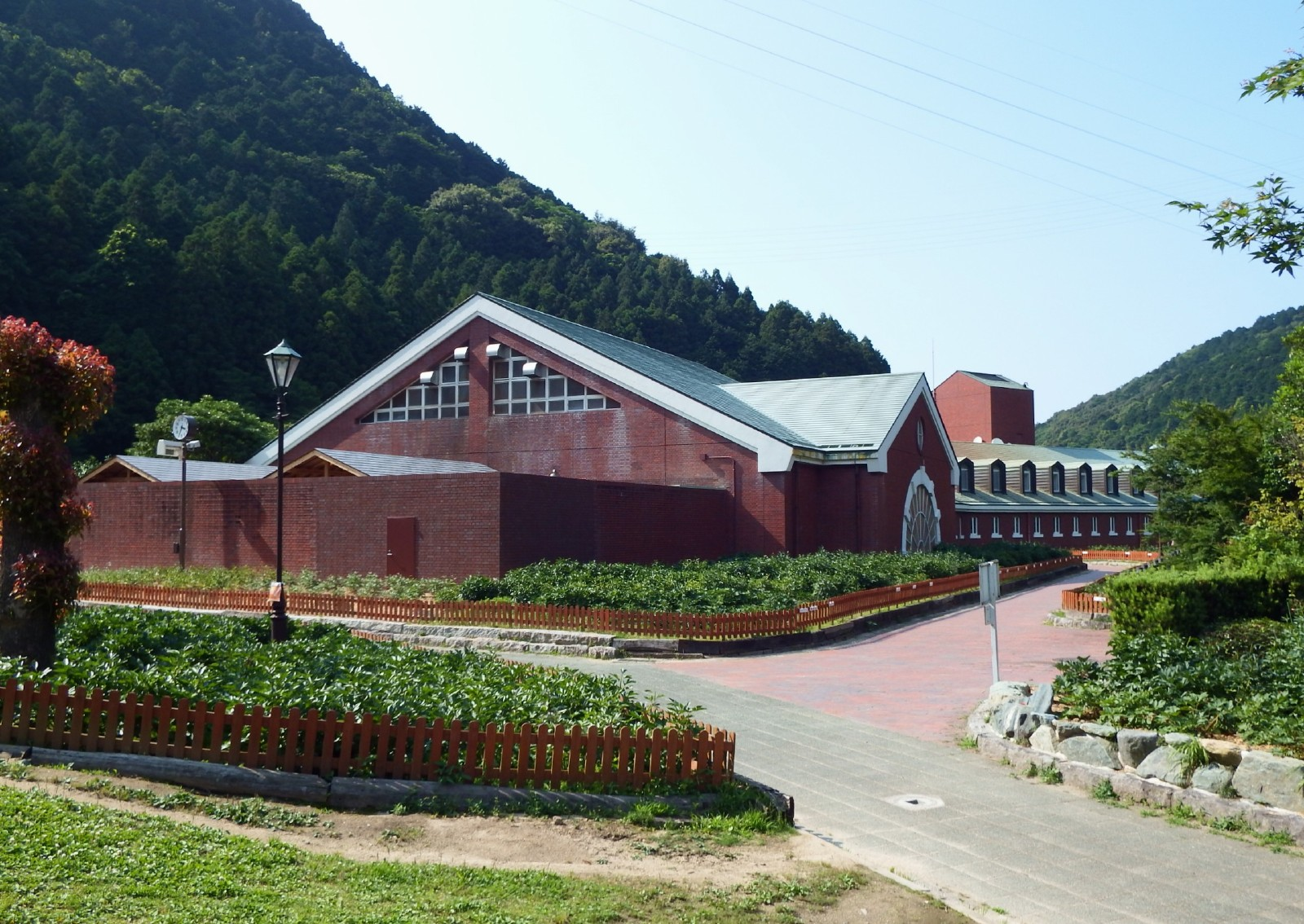 マイントピア別子の本館